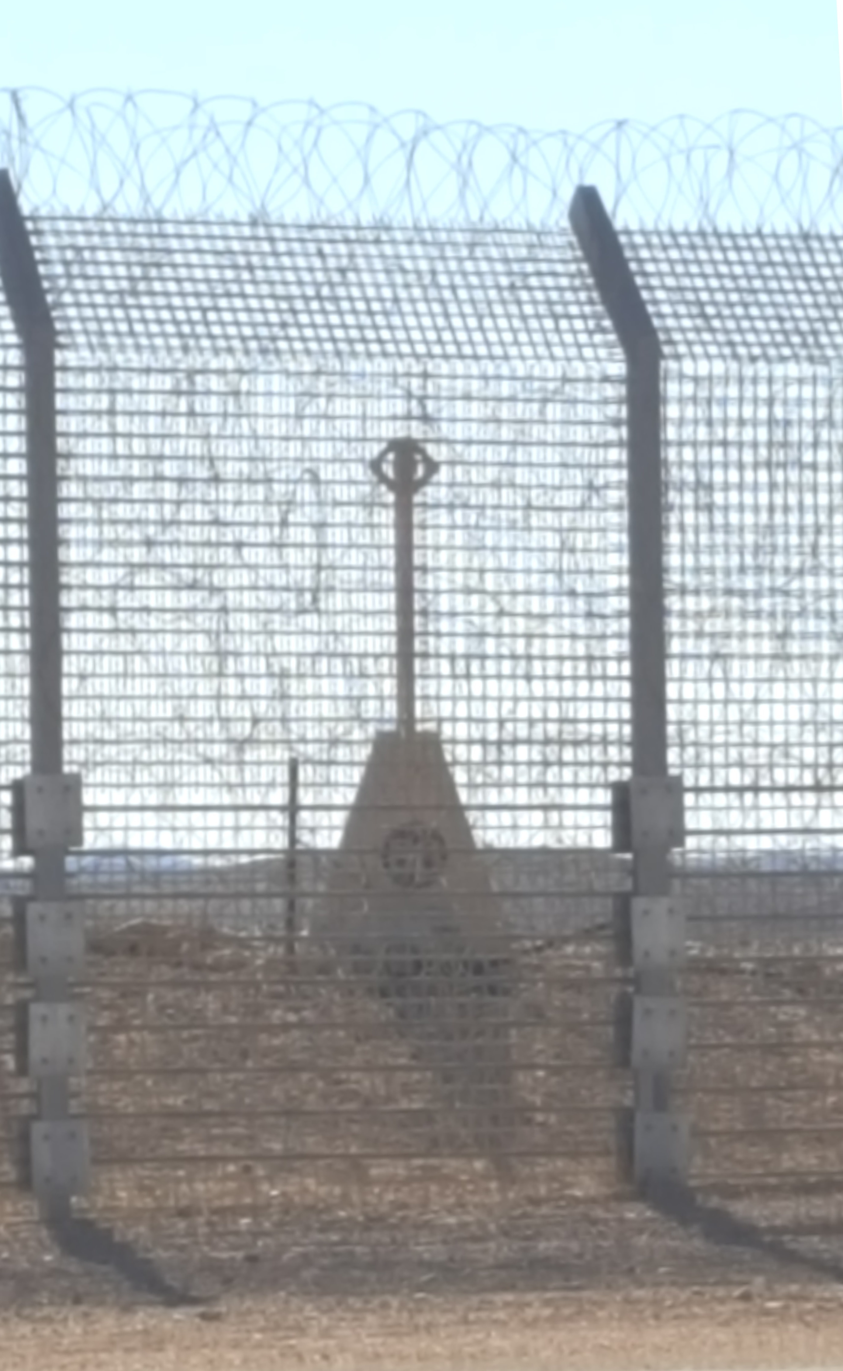 אבן לסימון הגבול עם מצרים